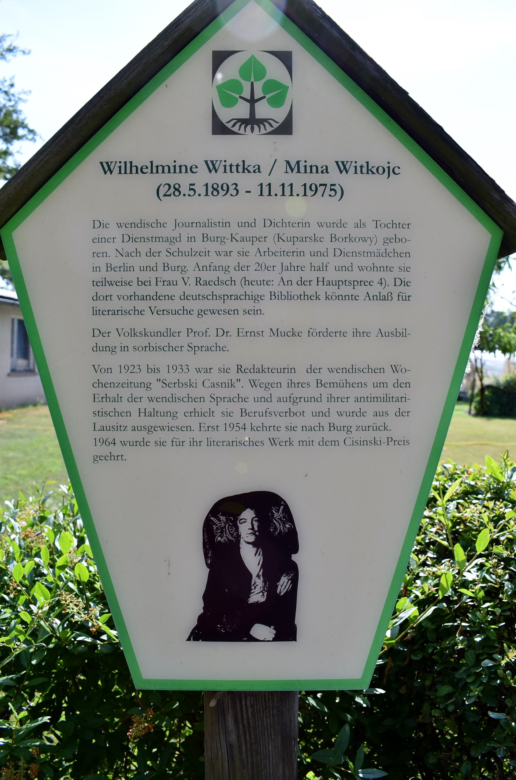 Gedenktafel für die niedersorbische Dichterin Mina Witkojc in Burg-Kolonie im Spreewald, An der Hauptspree